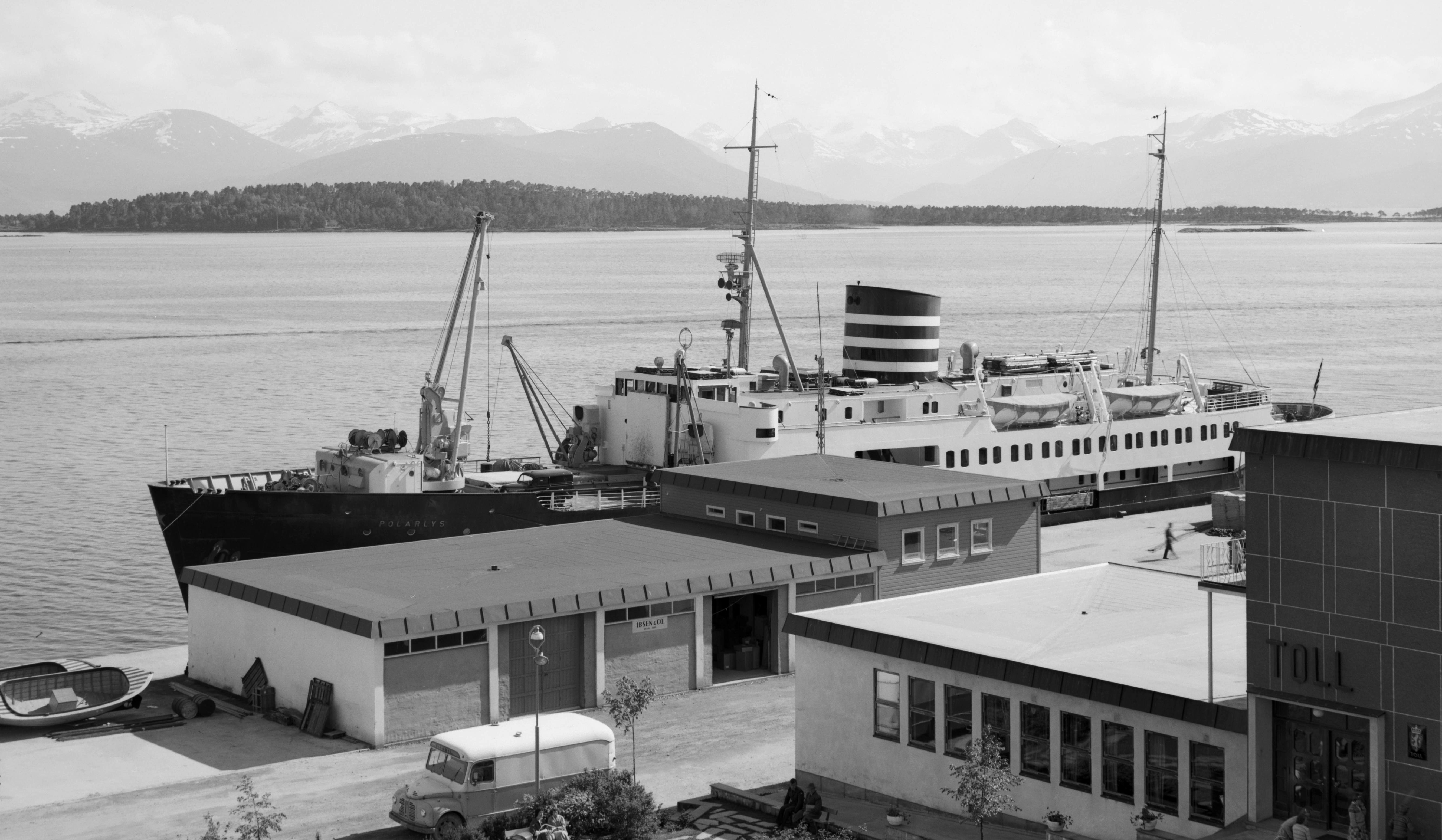 Bildet er hentet fra Nasjonalbibliotekets bildesamling. Anmerkninger til bildet var: Fotograf: E-K Q Molde,Moldefjorden, Molde, Møre og Romsdal.Det Bergenske Dampskibsselskabs hurtigruteskip MS «Polarlys» bygd i 1952. Sted er Storkaia i Molde.